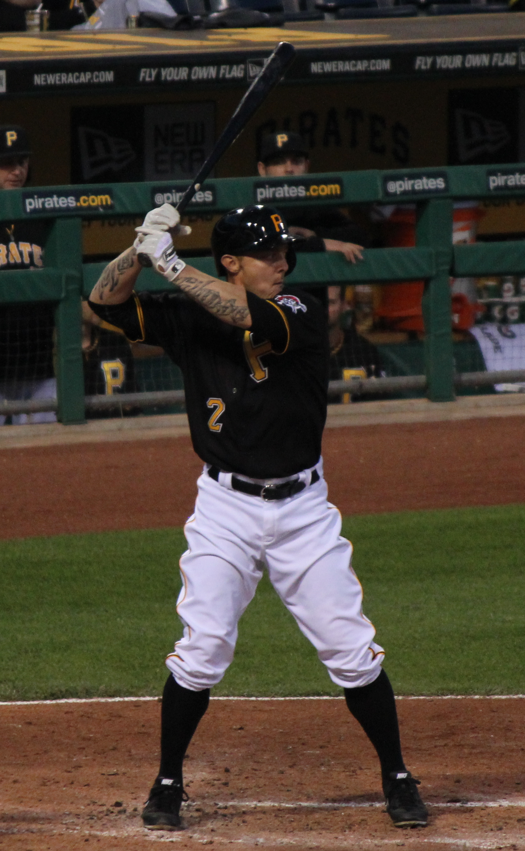 Brandon Inge